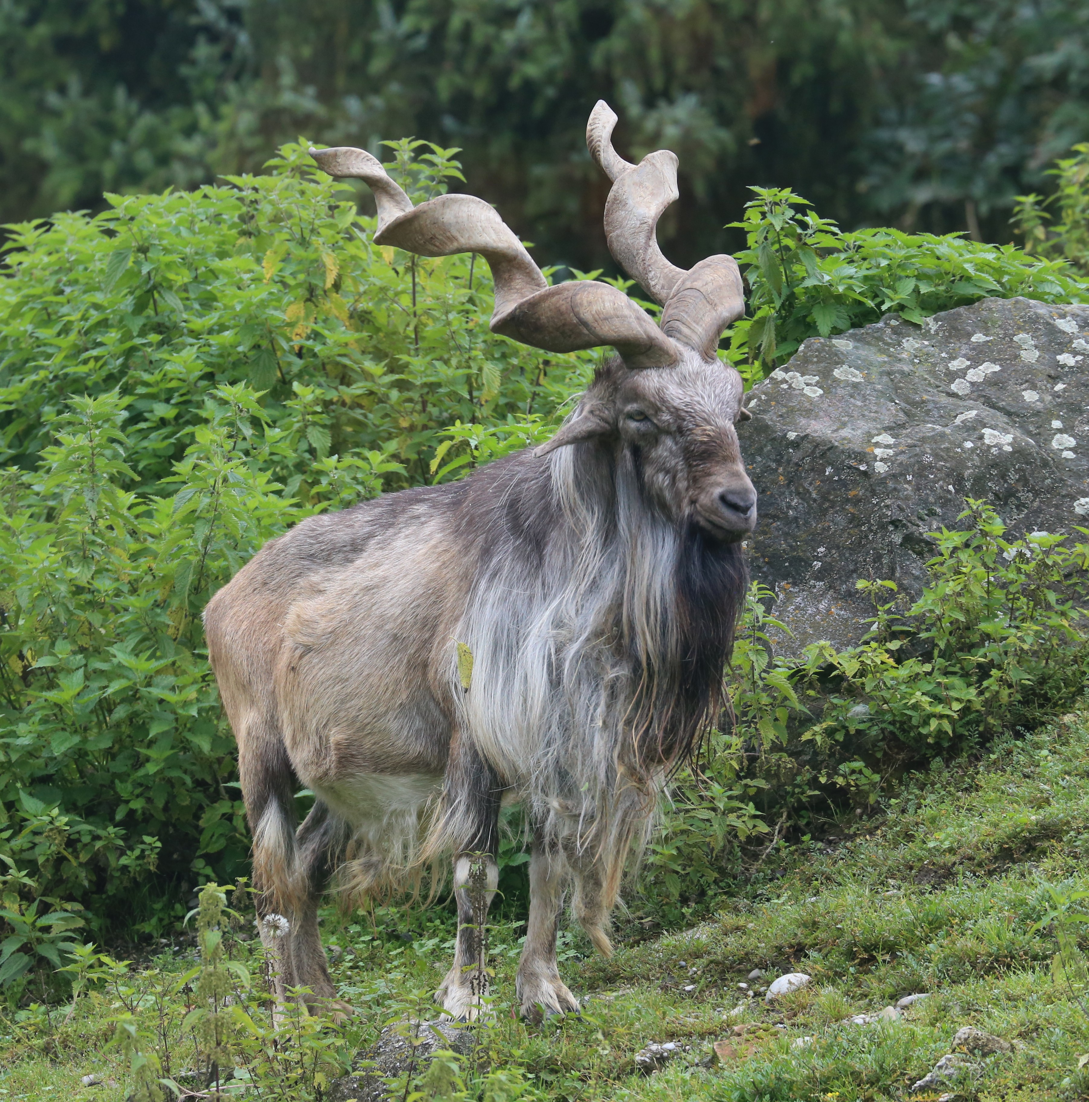 Markhor (Schraubenziege), Capra falconeri, Zoo Augsburg